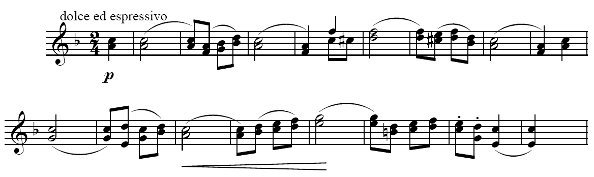 Melodie des Trios des San-Lorenzo-Marsches